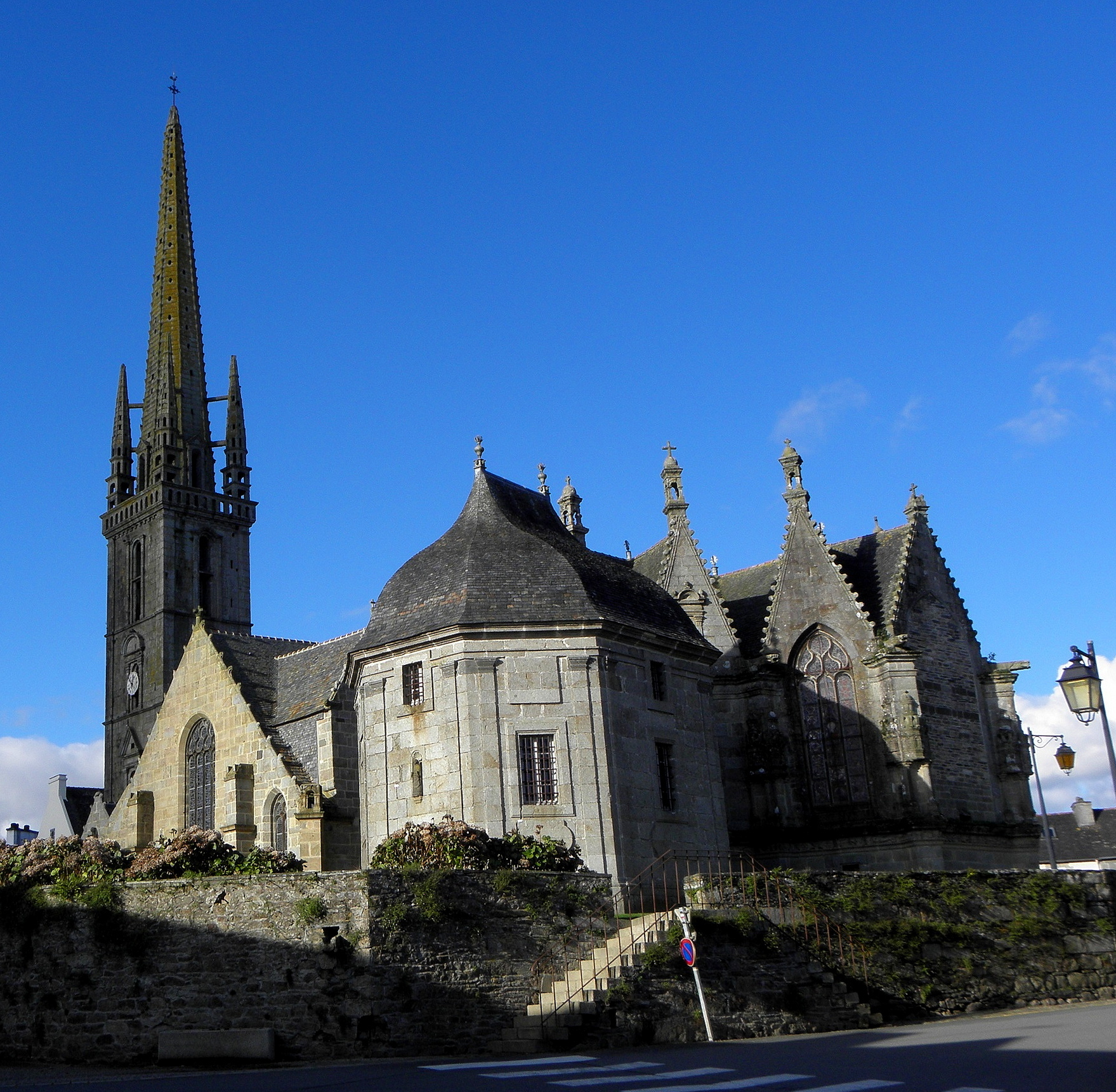 Extérieur de l'église Saint-Suliau de Sizun (29). Clocher, flanc sud, sacristie et chevet.